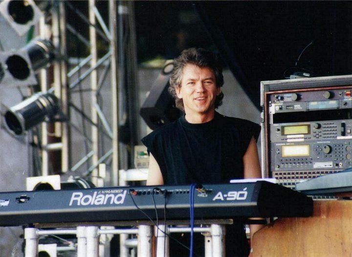 Barta Alfonz, becenevén Talfi (Miskolc, 1957. március 26. –) magyar billentyűs, az eredeti Edda Művek tagja.